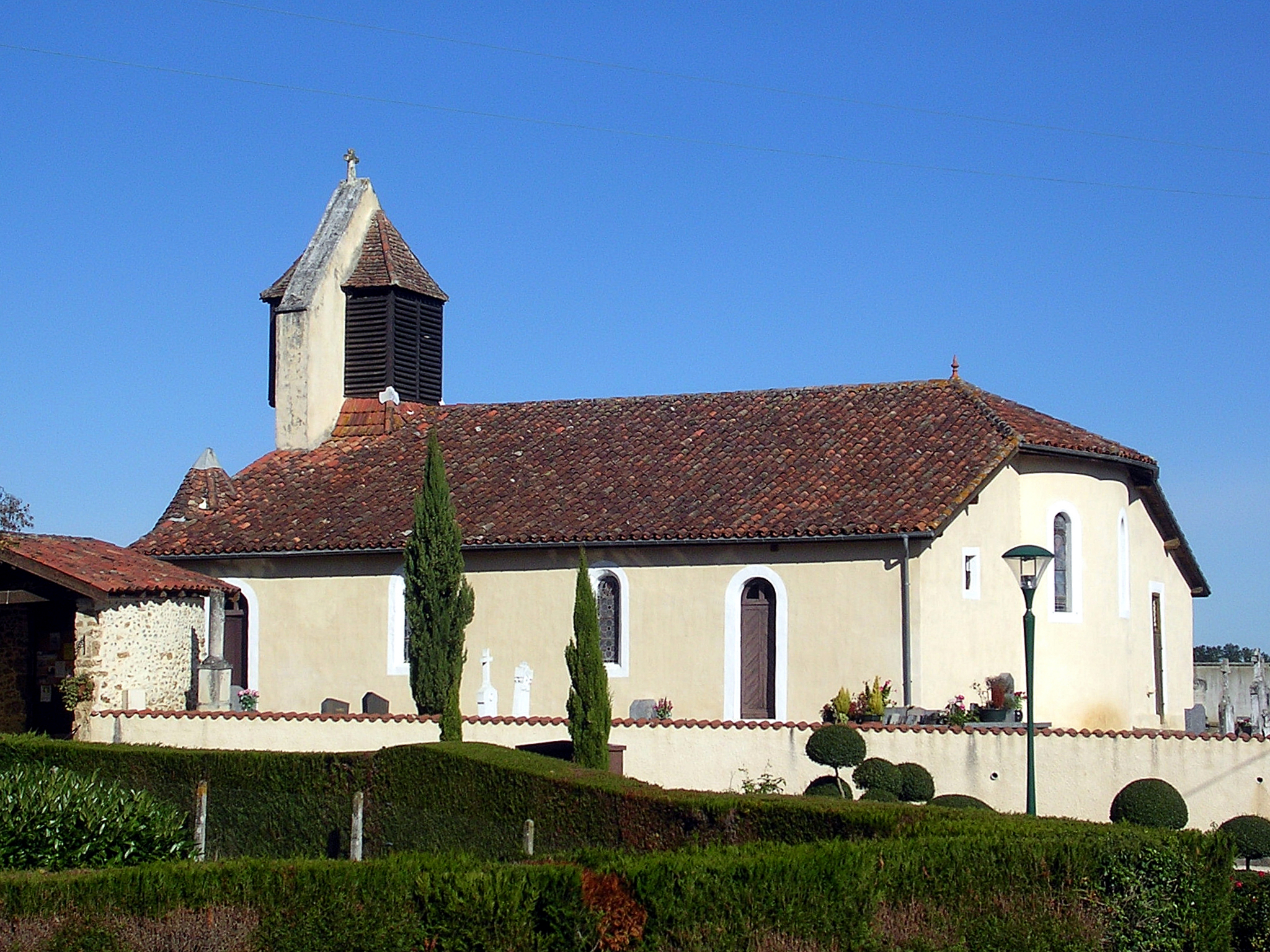 Le Leuy (Landes, France), église Notre-Dame